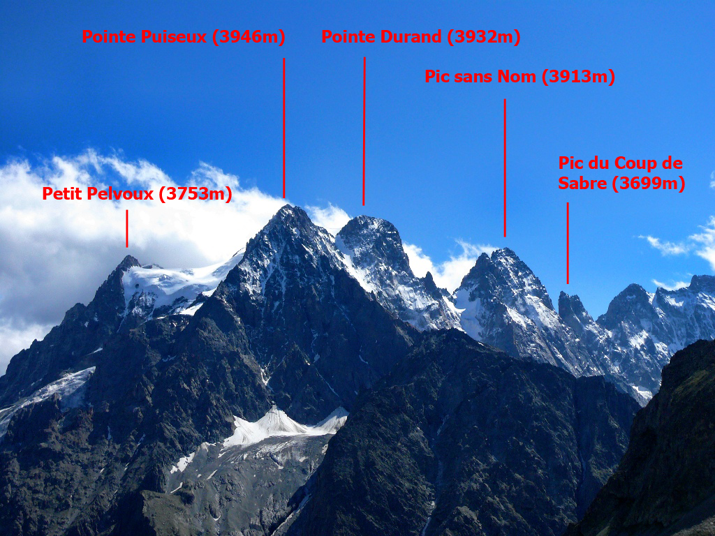 Mont Pelvoux et sommets alentour depuis le Glacier Blanc